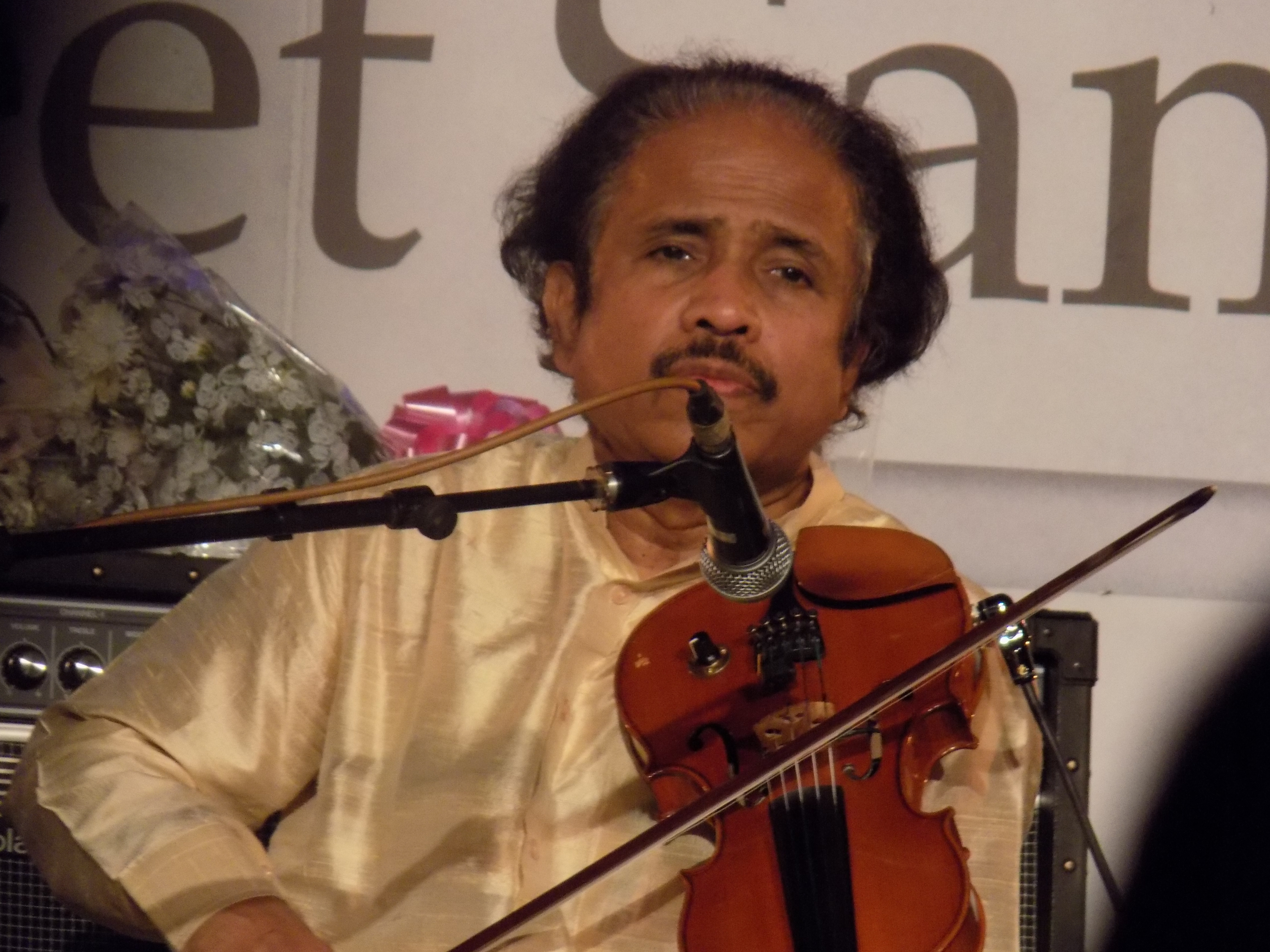 Photographed in Kolkata, India